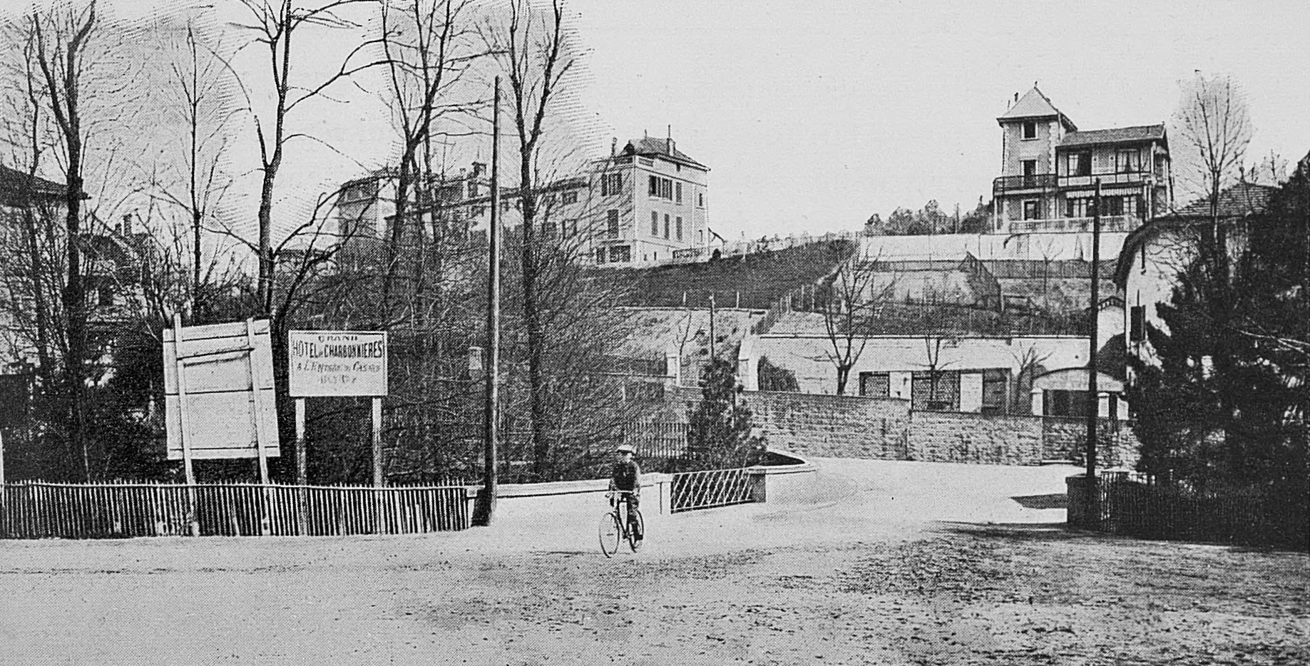 Dictionnaire illustré des communes du département du Rhône. Tome 1 / par MM. E. de Rolland et D. Clouzet.